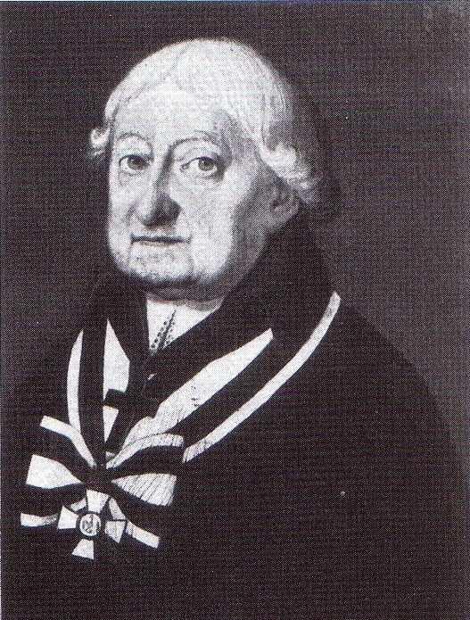 Pfarrer Dr. Ludwig Ernst von Borowski (1740-1834), Träger des Schwarzen Adlerordens